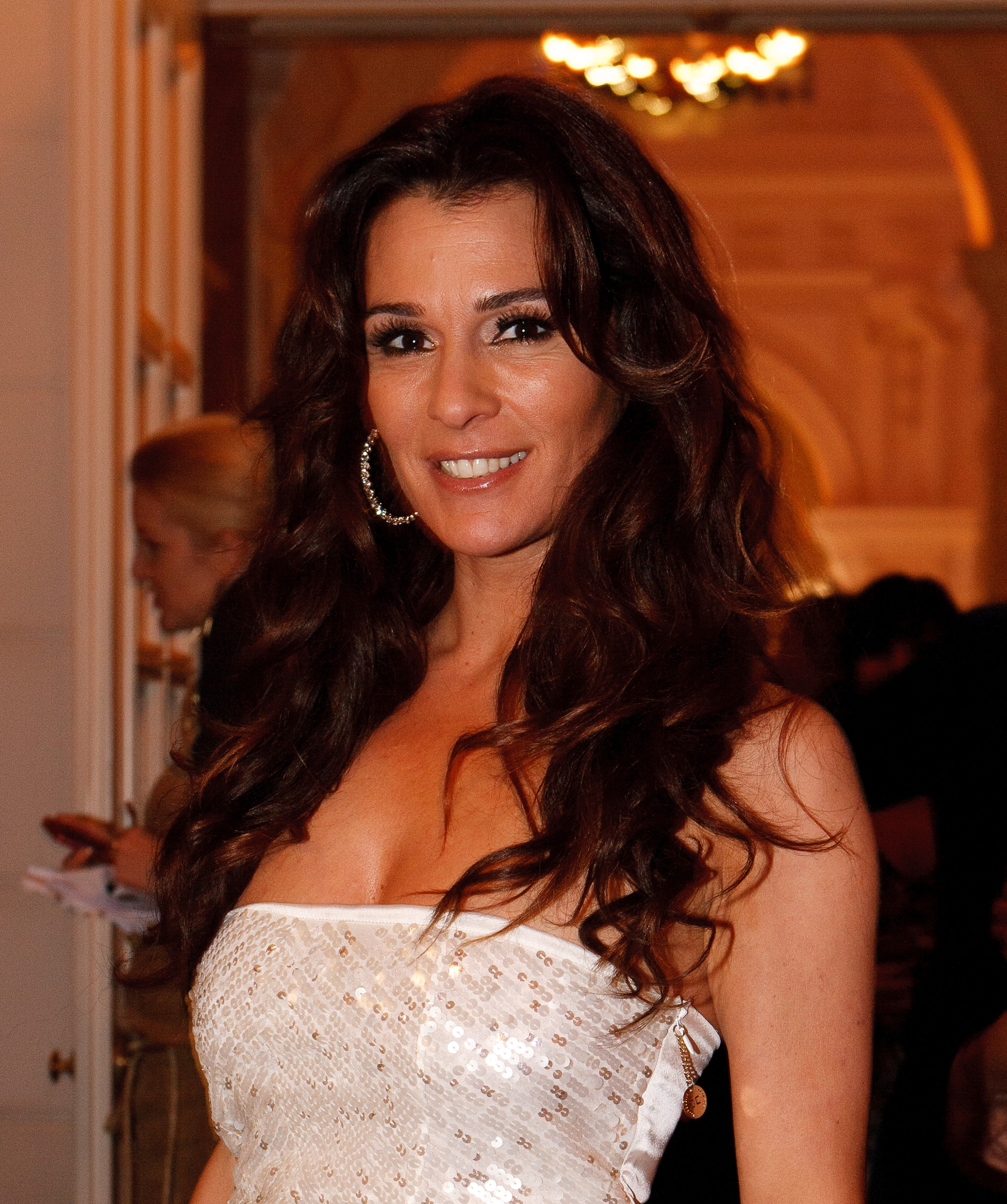 Televisiepresentatrice Quinty Trustfull tijdens de Beau Monde Awards 2010